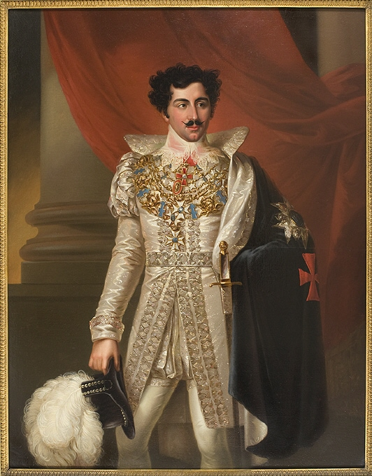 Kung Oscar I iklädd Serafimerordens stora dräkt, samt bärandes runt halsen Serafimerordens, Nordstjärneordens, Svärdsordens samt. Vasaordens kedjor. Runt halsen bär han även Carl XIII:s ordenskors. Ordensdräkt för Serafimerorden bars senaste gången vid just Oscar I:s kröning 1844. Målning av Fredric Westin. Tillhör Nationalmuseum med inventarienummer NMGrh 2392